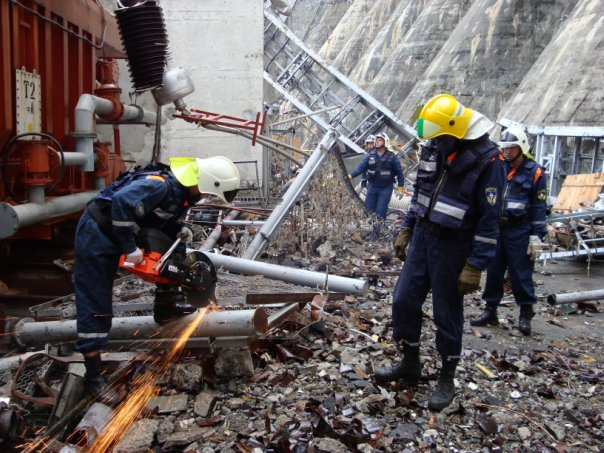 работы